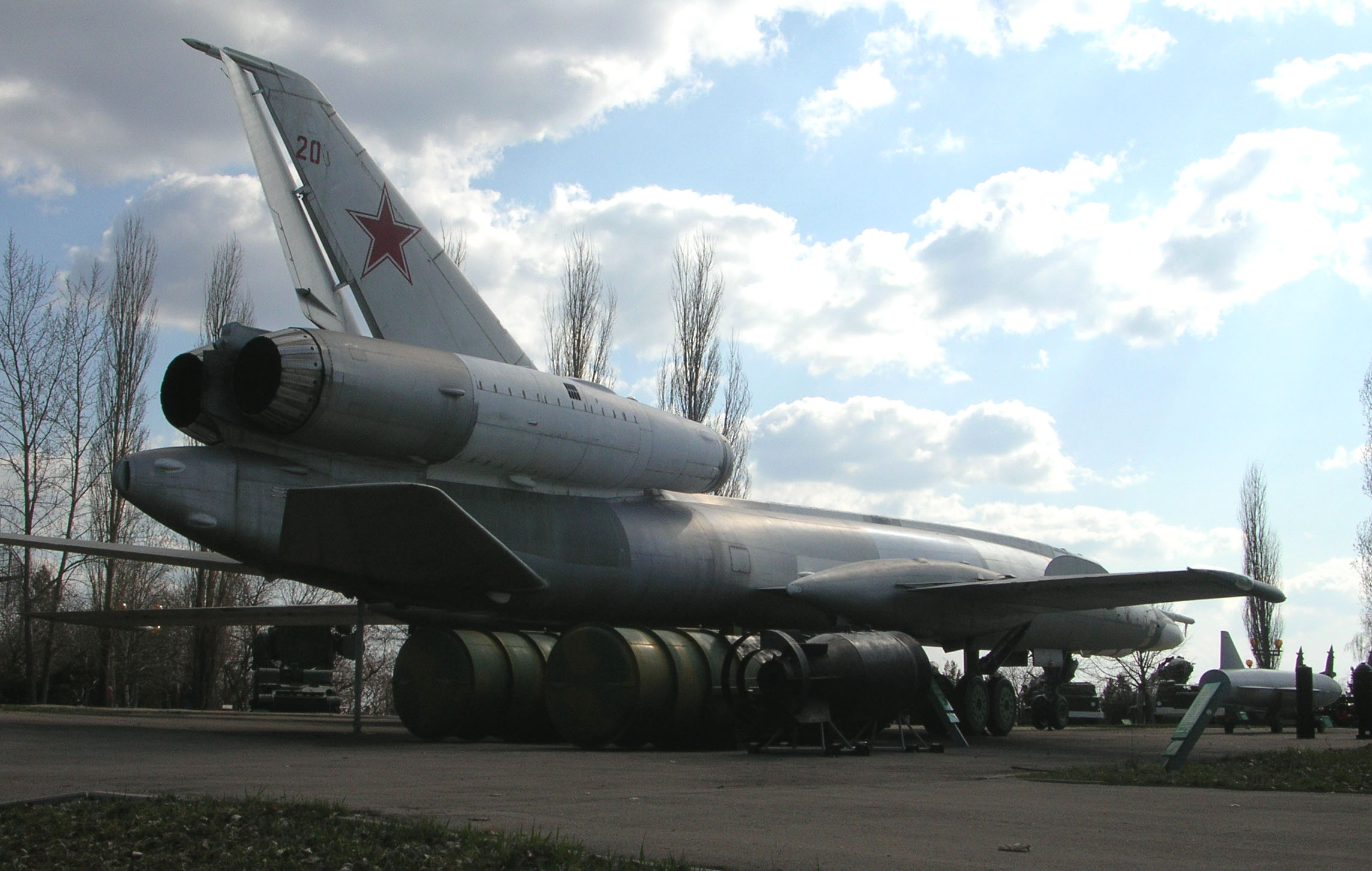 Парк Победы, г. Саратов.